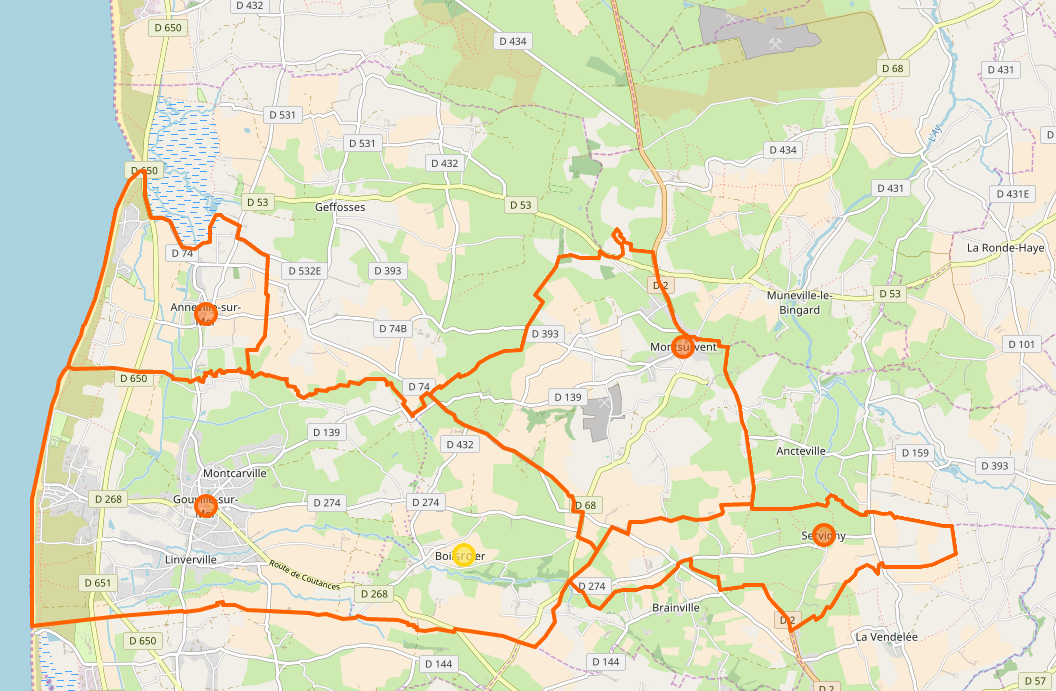 nouveau projet de commune nouvelle de Gouville-sur-Mer en 2019